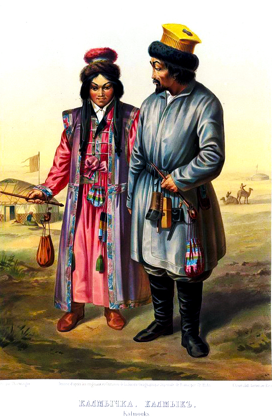 Калмыки. Этнографическое описание народов России Густава-Федора Христиановича Паули